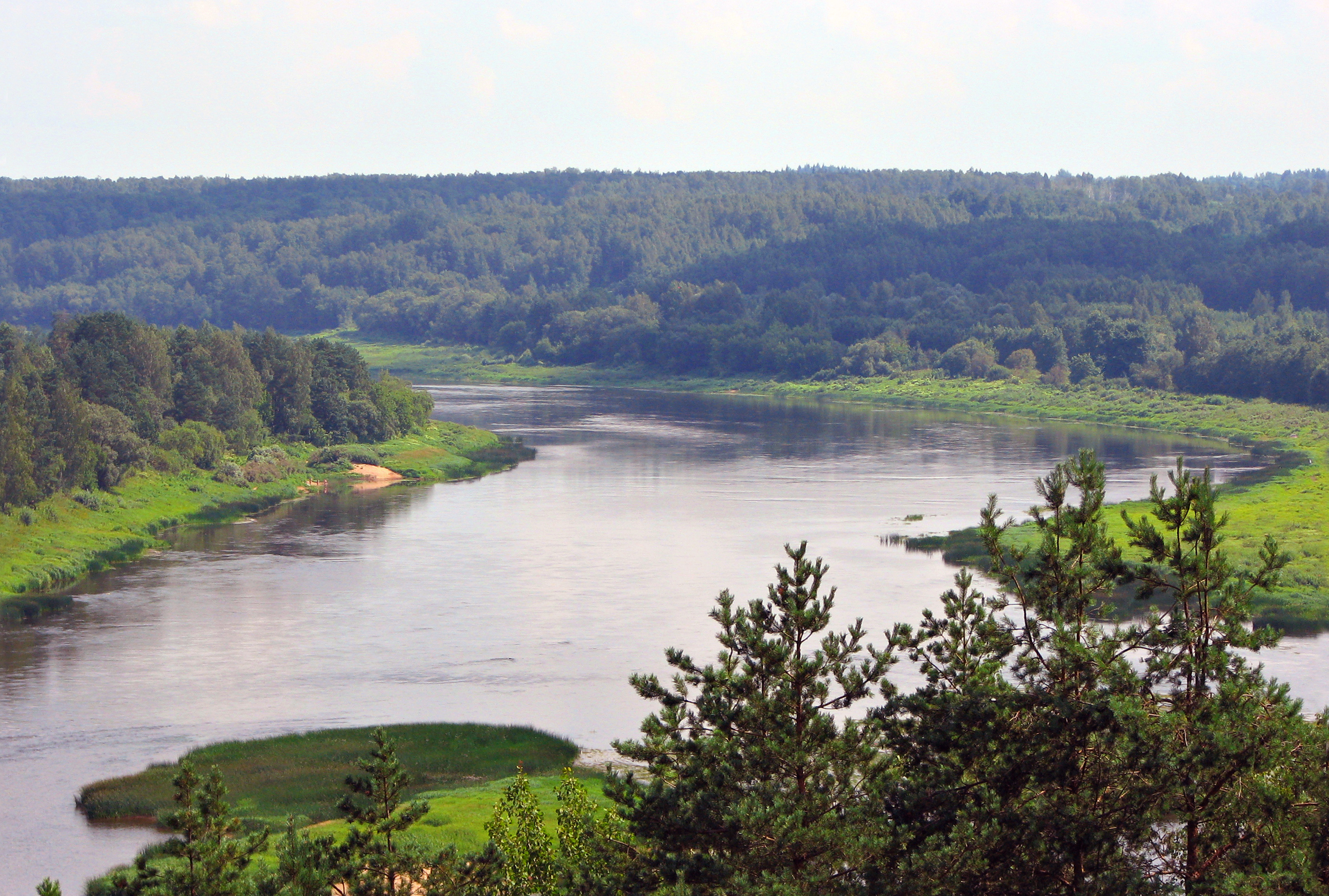 вид с карьера 1